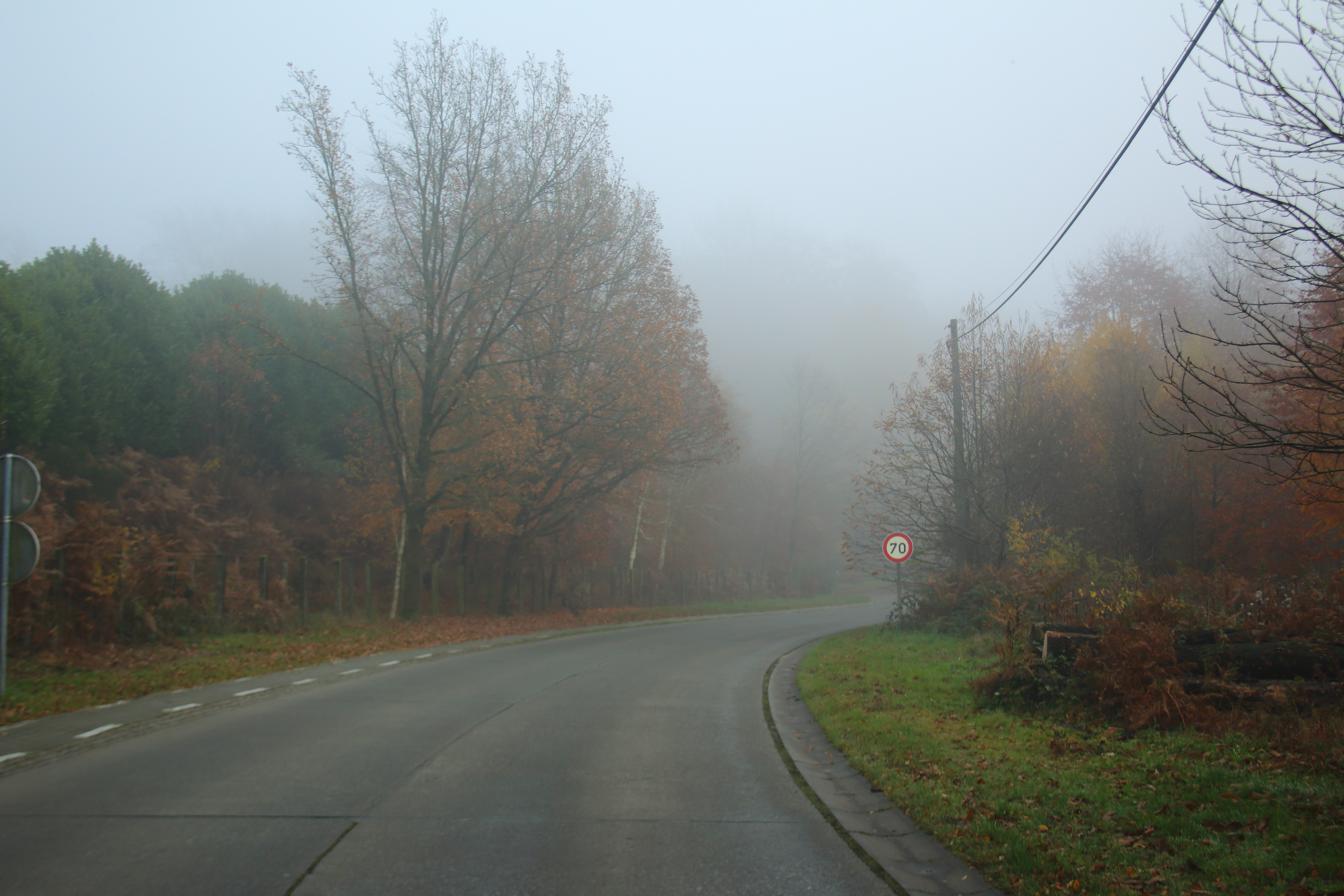 Hoppeberg, D'Hoppe-La Houppe, Vloesberg-Flobecq, Henegouwen, België